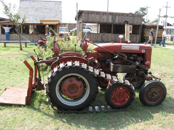 Farmall-Traktor mit Raupenantrieb